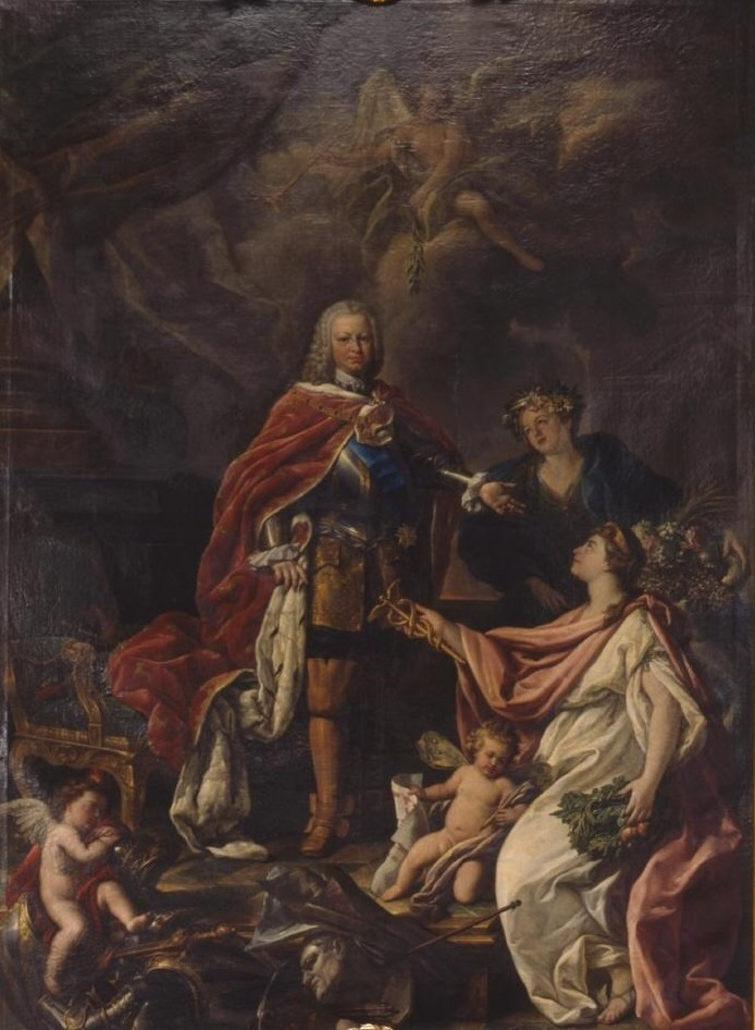 Retrato alegórico del rey Fernando VI de España (1713-1759), que fue hijo del rey Felipe V de España. En la obra aparece el rey de pie sobre un estrado, con armadura y manto real; lleva el collar de la Orden del Toisón de Oro y la banda de la Orden del Espíritu Santo. Dos alegorías femeninas le rinden homenaje: la Agricultura, que sostiene una cornucopia, y el Arte con el caduceo de Mercurio y las tres coronas de 1aurel, acompañada del pequeño genio del dibujo. Los símbolos de la arquitectura, pintura y escultura ocupan la zona inferior, junto a un amorcillo que descansa sobre armaduras y espadas. Sobre el sillón del trono se ven el cetro y la corona. La Fama, aparece entre nubes, detrás del Rey, y difunde sus virtudes como gobernante. El cuadro fue un encargo de la Academia, y conserva su espléndido marco original de madera tallada y dorada con las tres coronas de laurel.